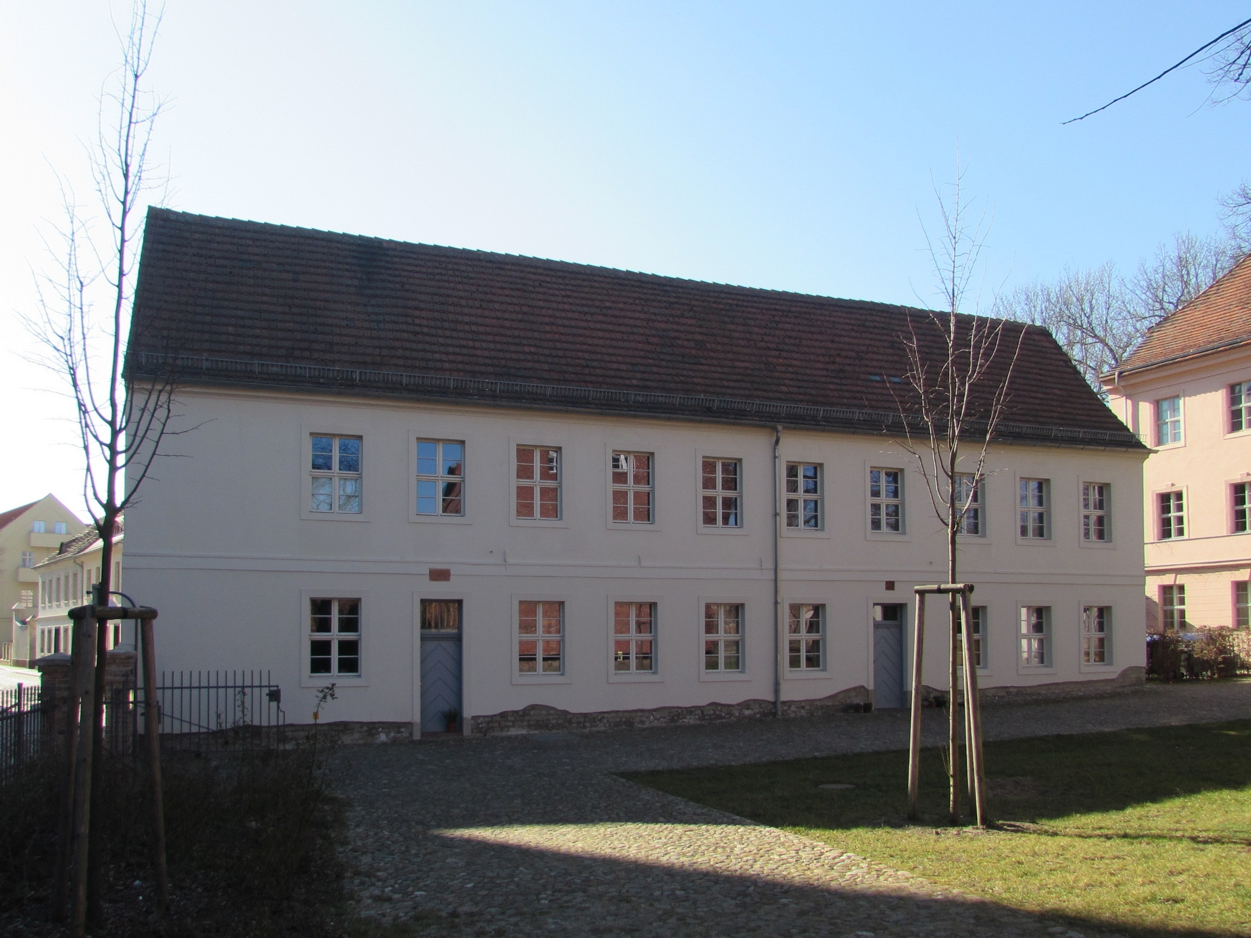 Seitengebäude Schule Gotthardtkirchplatz 9, Brandenburg an der Havel